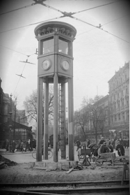 Башня с регулировщиком - прототип современного дорожного контроллера. Фото сделано в 1914 году.